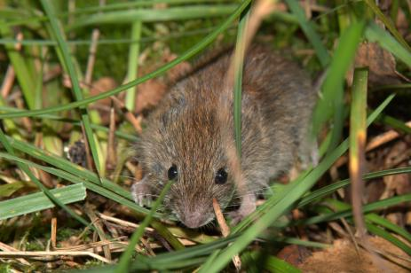 Campagnol roussatre, Auteur : Sylvain HAYE